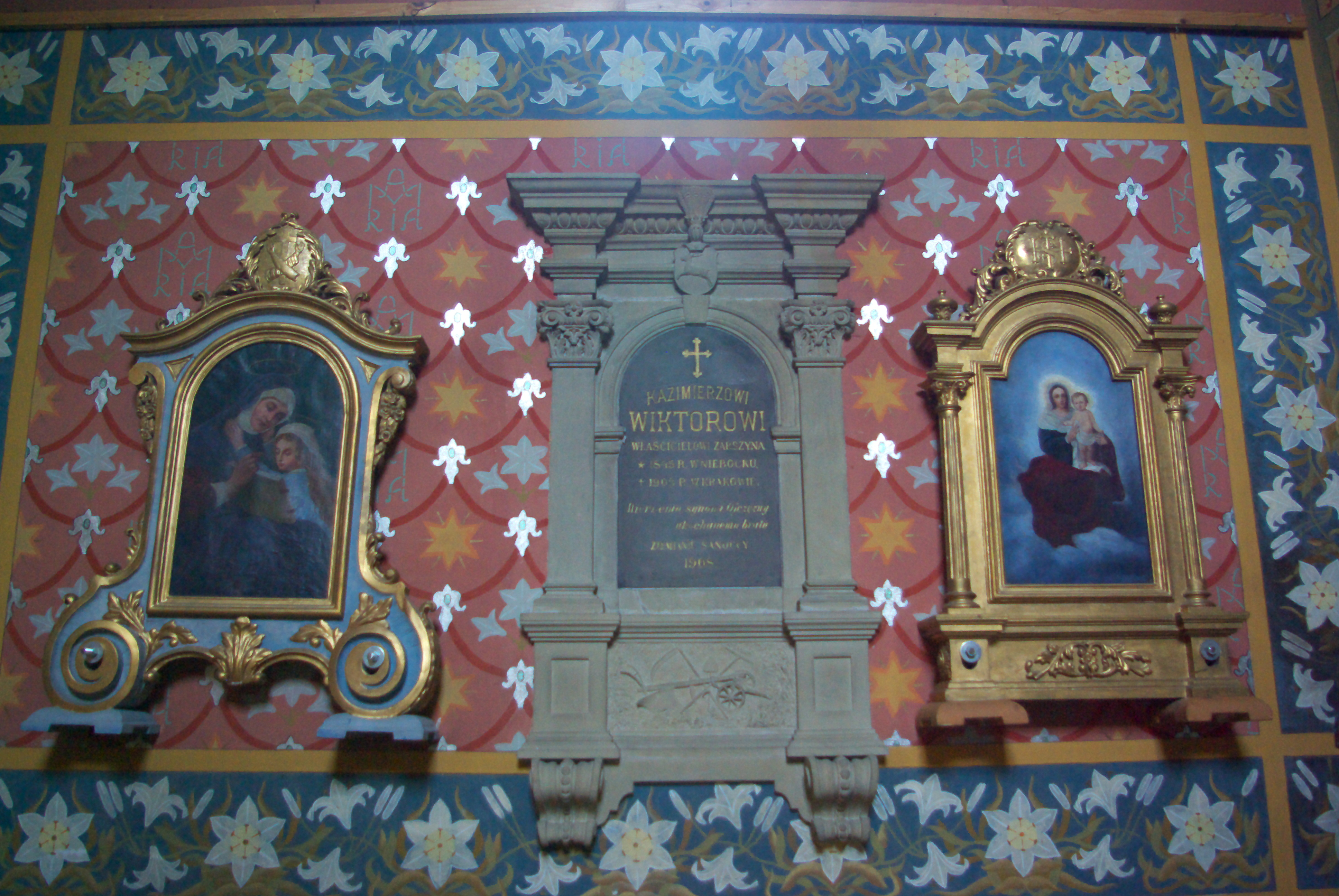 Lewa nawa im św. Maksymiliana Kolbe w kościele franciszkanów w Sanoku. Obrazy i epitafium Kazimierza Wiktora